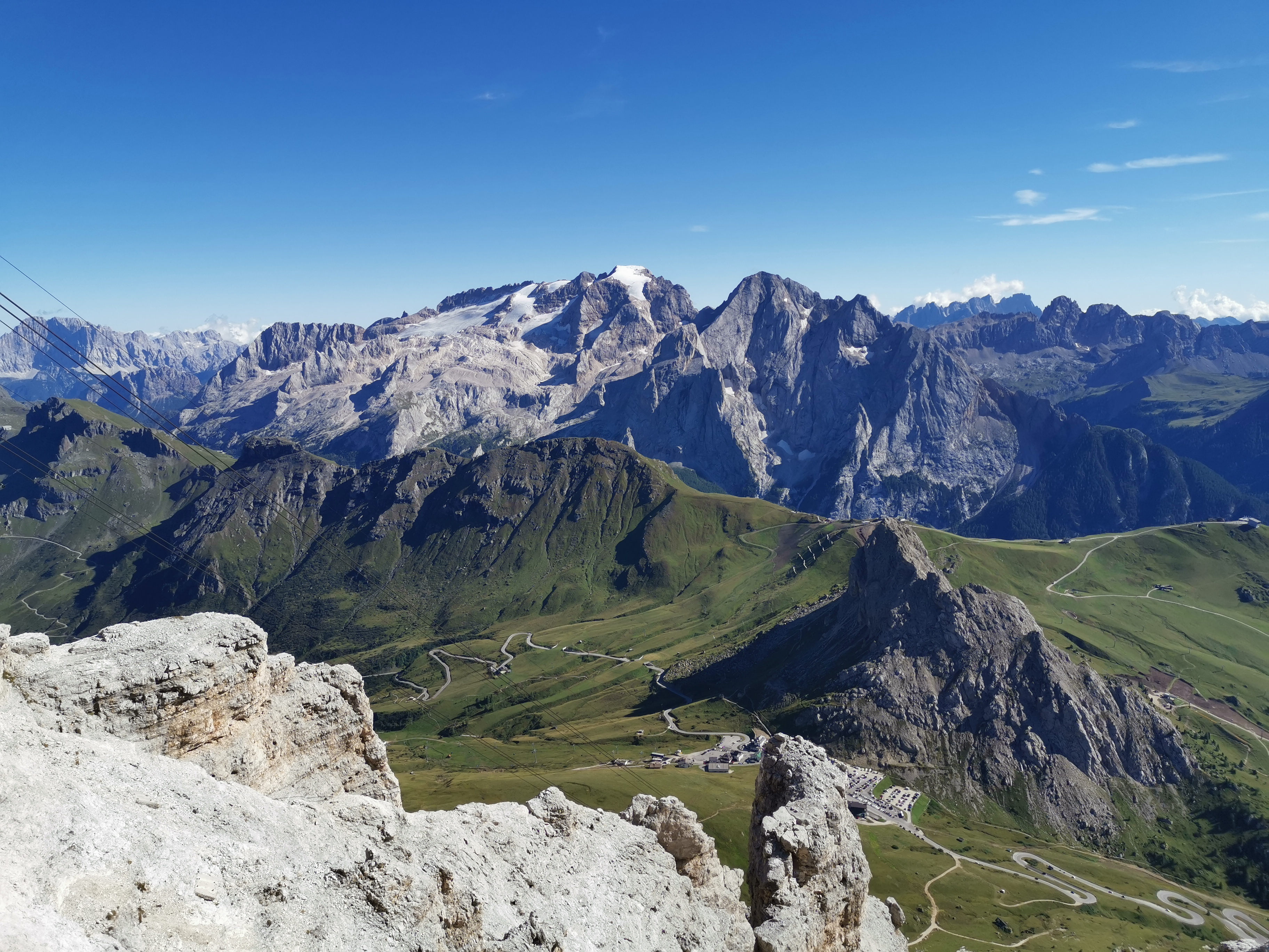 Blick zur Marmolada und zum Passo Pordoi vom Sass Pordoi